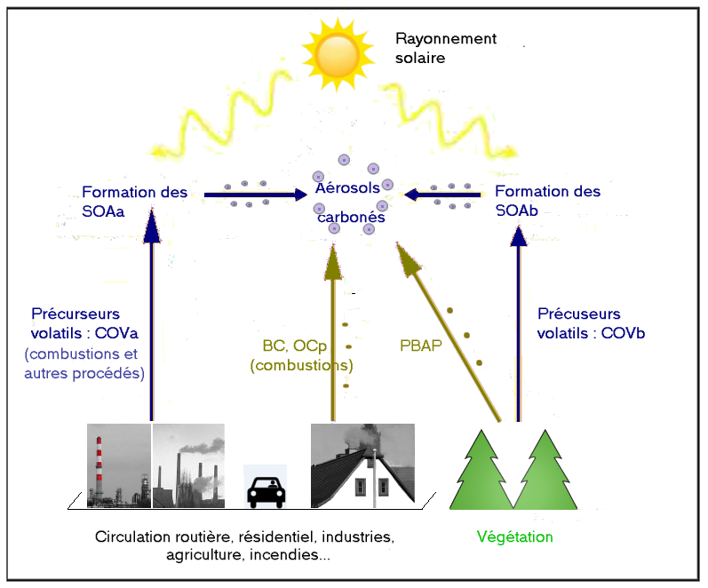 Les « aérosols atmosphériques » sont les particules, solides ou liquides, en suspension dans l'atmosphère. On regroupe sous le nom d'« aérosols carbonés » deux espèces chimiques différentes : le « carbone suie », ou « carbone noir » (anglais « Black Carbon » BC) et le carbone organique (anglais « Organic Carbon » OC). BC est intégralement émis par les sources de combustion tandis que OC comporte à la fois une partie émise (OC primaire, OCp) et une partie formée secondairement par photochimie dans l'atmosphère : Aérosols Organiques Secondaires (AOS, anglais SOA). Les SOA peuvent avoir deux origines : anthropique (SOAa) ou biogénique (SOAb). La formation secondaire de SOA s'effectue par photo-oxydation de Composés Organiques Volatils (COV) dits « COV précurseurs ». Une part des OCp émises provient également directement de la végétation (aérosols primaires biogéniques, anglais : PBAP – Primary Biogenic Aerosol Particles). La végétation émet également des COV biogéniques (COVb), précurseurs d’aérosols organiques biogéniques secondaires (SOAb).